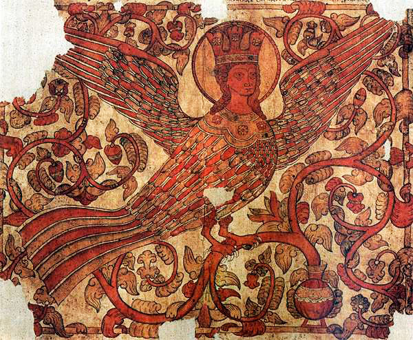 Райская птица Сирин. Hеизвестный художник середины ХIХ века. Северодвинский центр. Бумага, чернила, темпера. 34,4 х 41,8. Лист имеет утраты по краям По верхнему краю картинки надпись: яже глаголю райскую птицу, иже кто глас ея и во след ея идет и вся здешняя зобывает не мог, пад умирает. ГИМ Инв. 43499/ИIII хр-10046 Лист имеет утраты по краям. Приобретено в 1906 на торгу в Москве. Сирин своим происхождением также обязана литературной средневековой традиции. Рассказы о сладостном и чарующем воздействии пения Сирина на человека содержатся в таких литературных памятниках XVII века, как Физиологи, Азбуковники, Хронографы. В апокрифической литературе сообщается, что птица Сирин боится громких звуков, и, чтобы отпугнуть ее, люди звонят в колокола, стреляют из пушек, трубят в трубы.